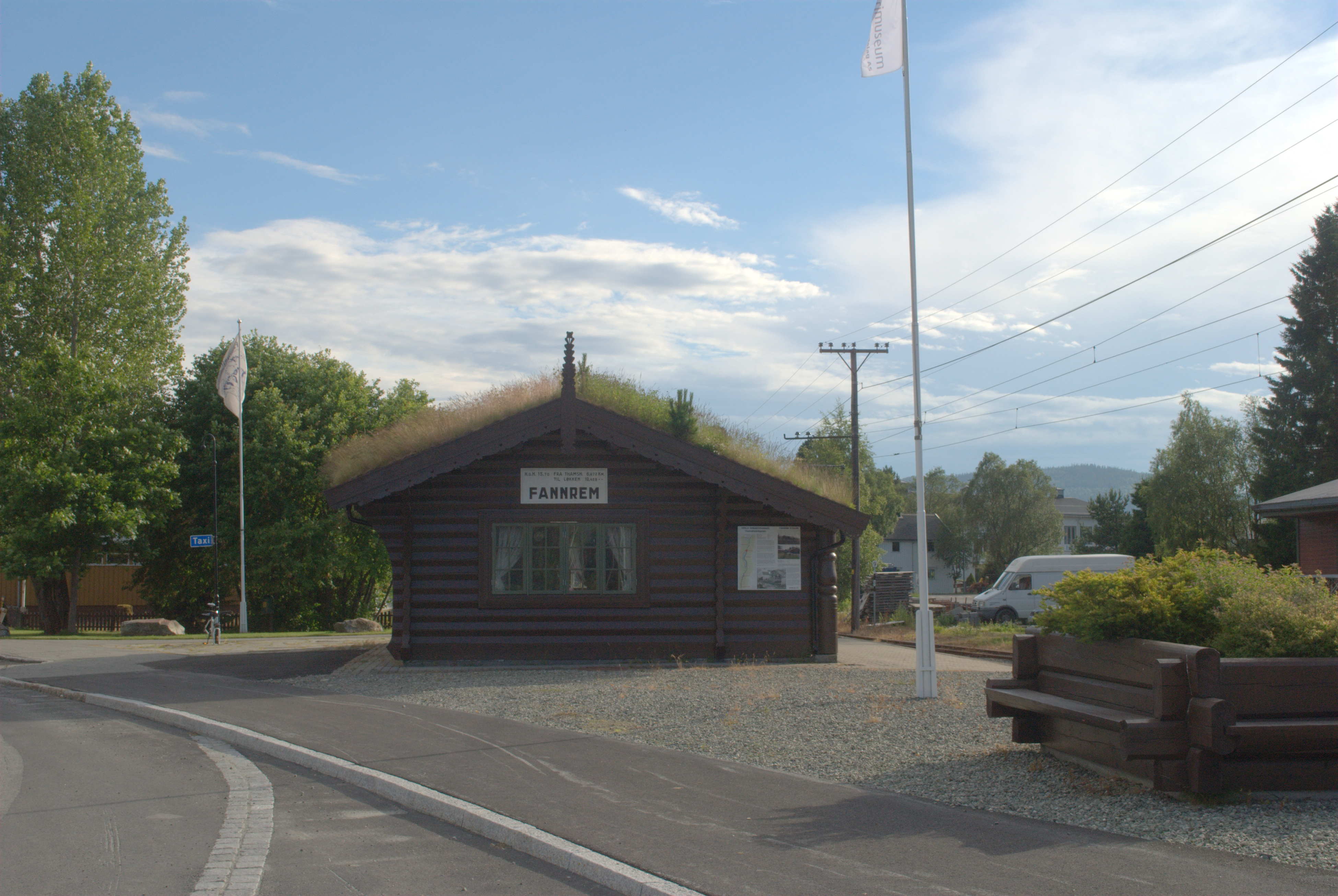 Fannrem stasjon på Thamshavnbanen ved Fannrem i Orkdal kommune i Sør-Trøndelag.